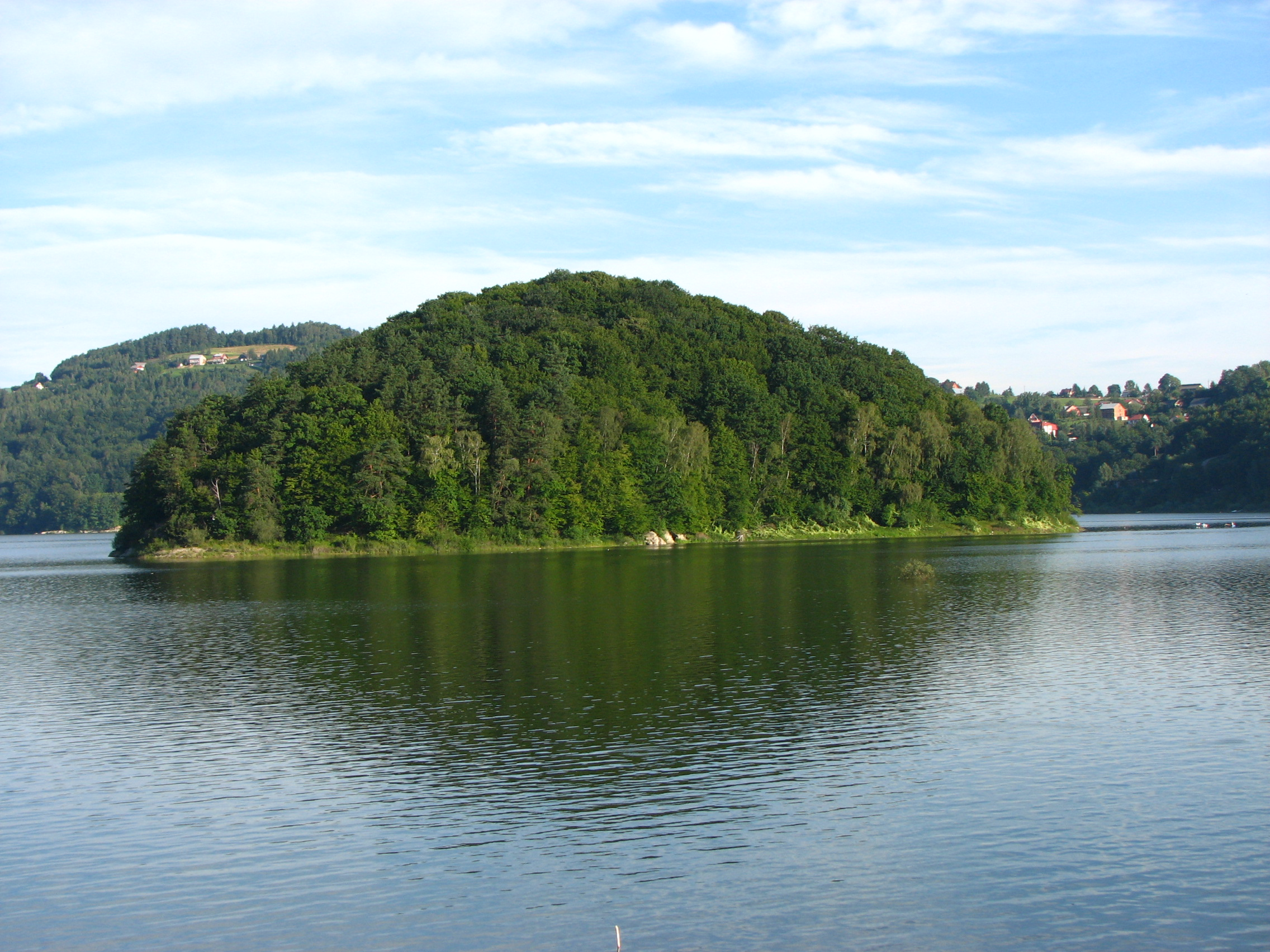 Małpia Wyspa w Gródku nad Dunajcem